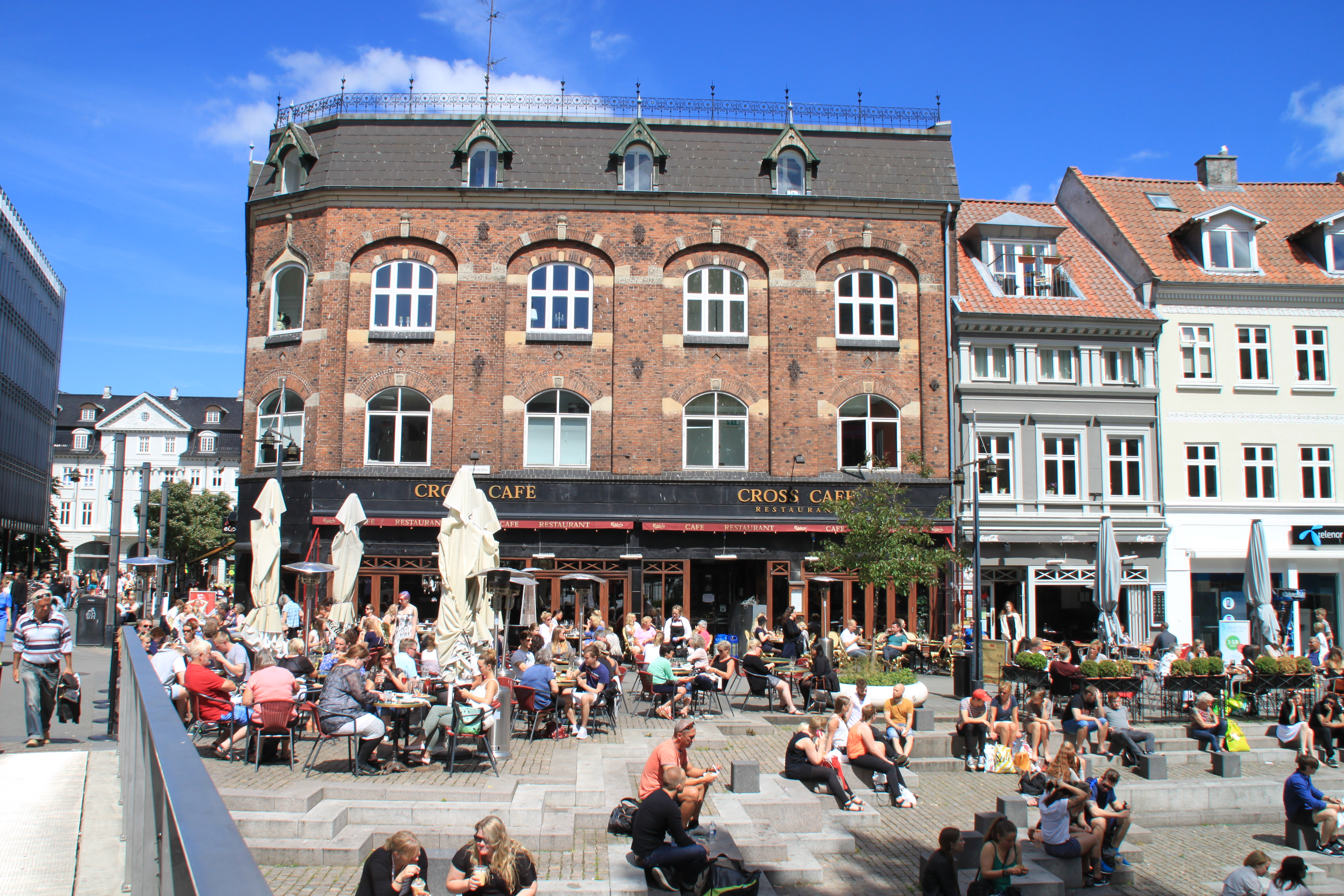 Aarhus-Stadtzentrum